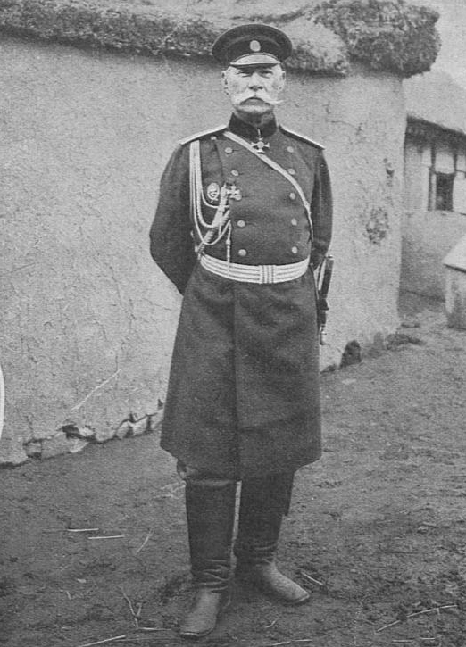 Зарубаев, Николай Платонович